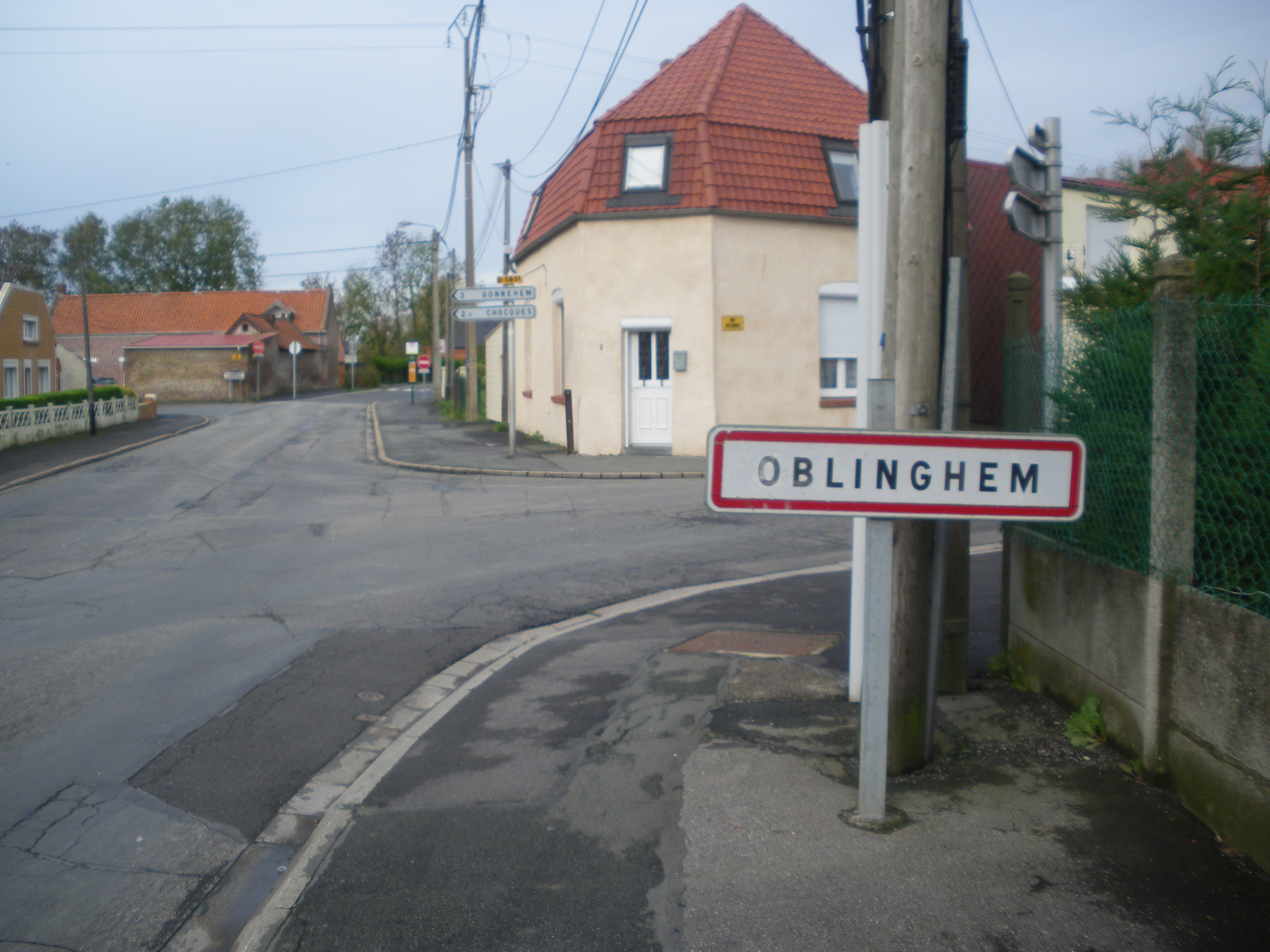 Panneau d'entrée d'Oblinghem, vu depuis Vendin-les-Béthune.